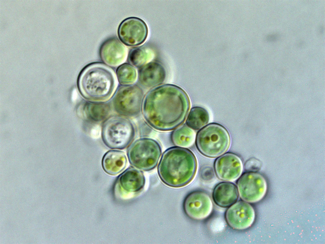 Cyanidium sp. strain O5A. / Microscope:Olympus BX51 (DIC)